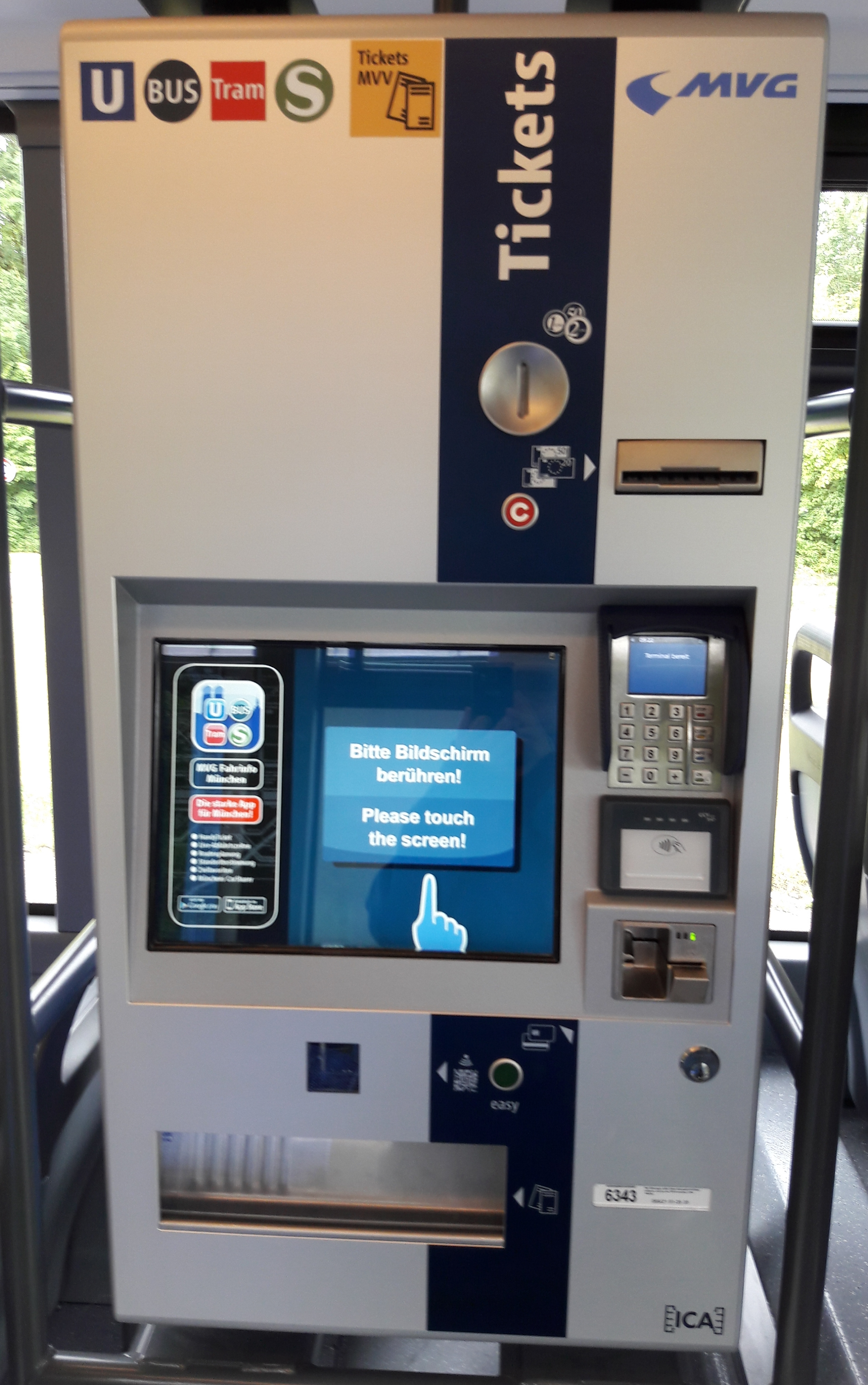 MVG Automat im Bus nr. 1279